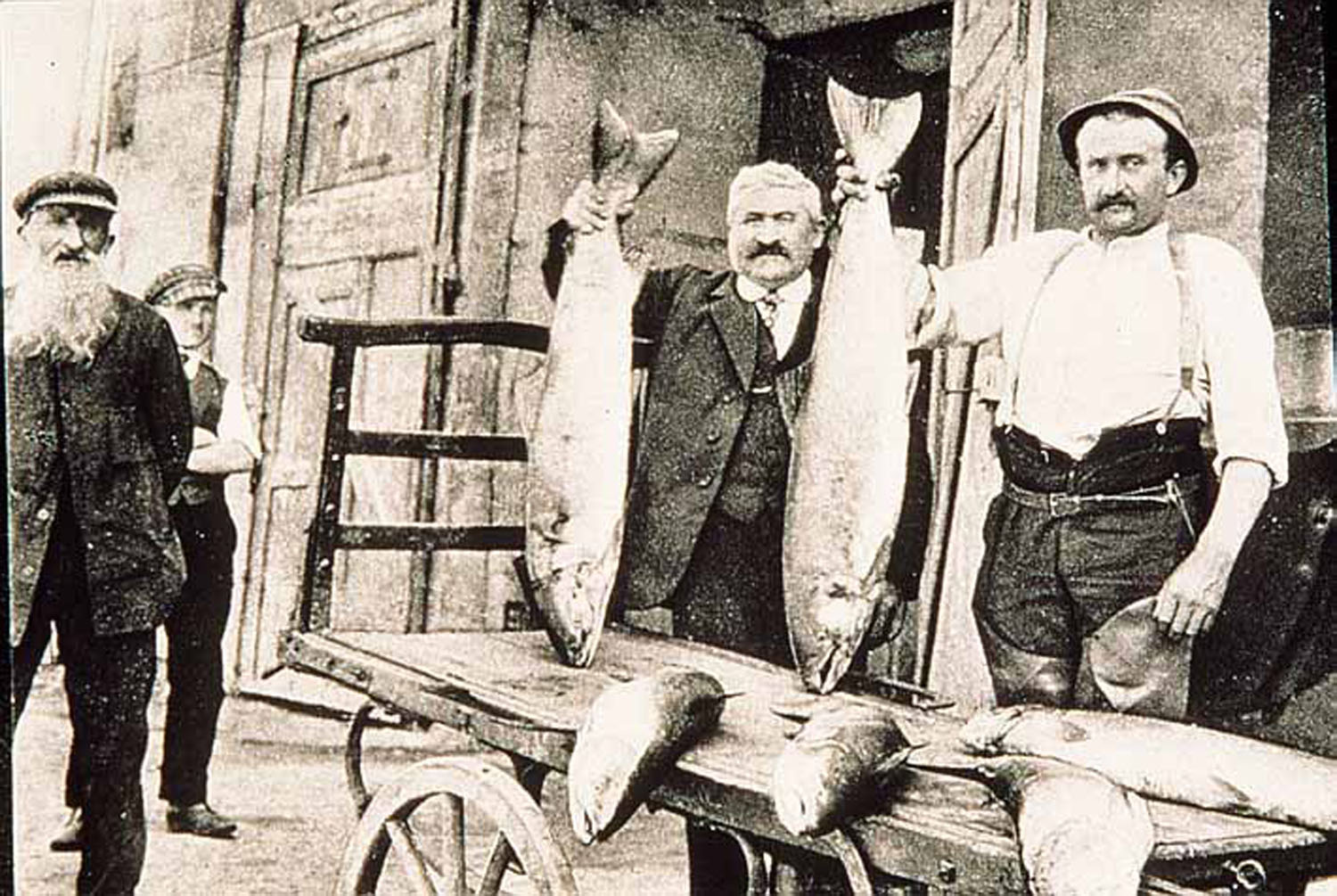 Saumons de l'Adour pêchés dans le Gers